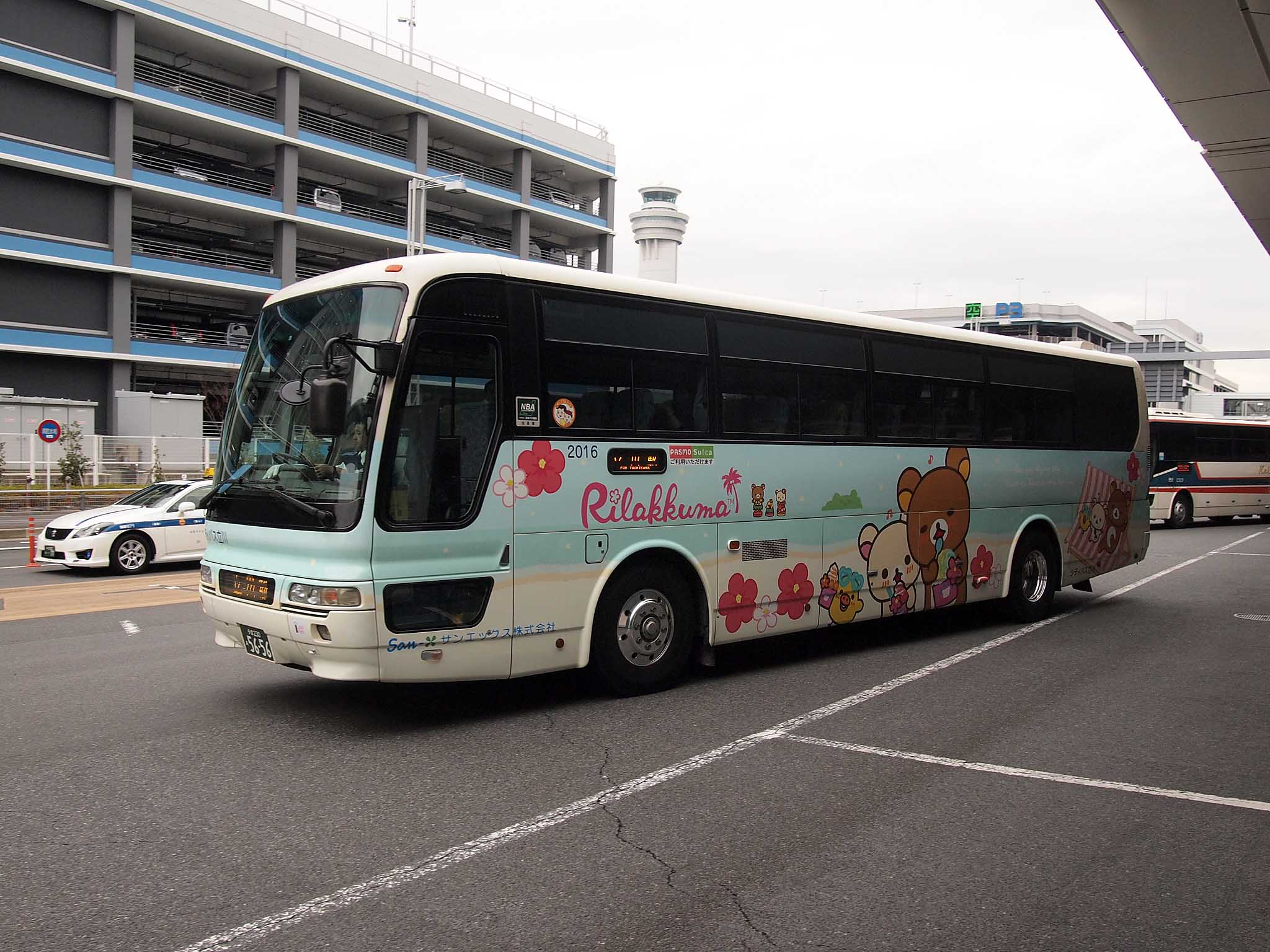 立川バスのリラックマバス5号車。子会社のシティバス立川が運行する羽田空港リムジン立川・拝島線に就役している。 型式：三菱ふそう・エアロバス PJ-MS86MP 登録番号：多摩230あ5656 撮影地：東京国際空港国内線第二ターミナル